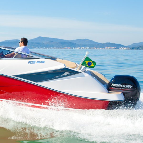 Motor de popa em lancha de passeio